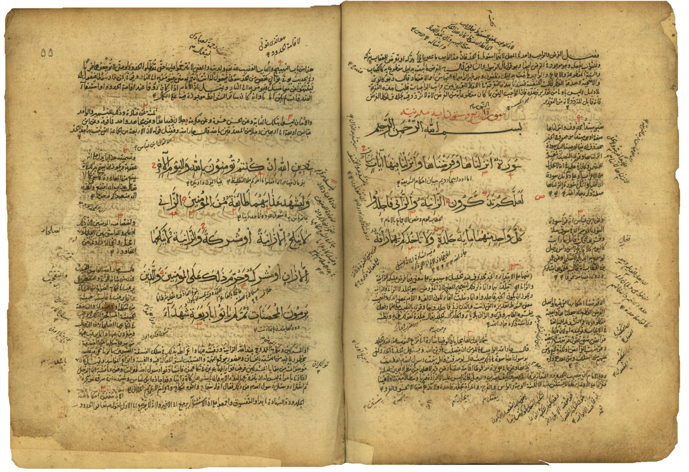 تفسیر ابوالفضل دیلمی جلد دوم نسخه 4028 مجلس